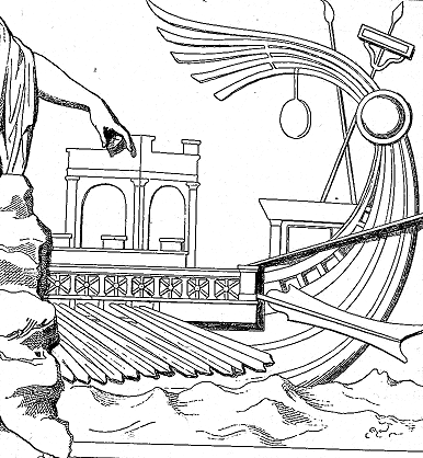 Bireme aus Baumeister: Denkmäler des klassischen Altertums. 1888. Band. III., Seite 1635. Teilabbildung auf Relief